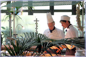 Kulinarium der Mensa Uhlhornsweg